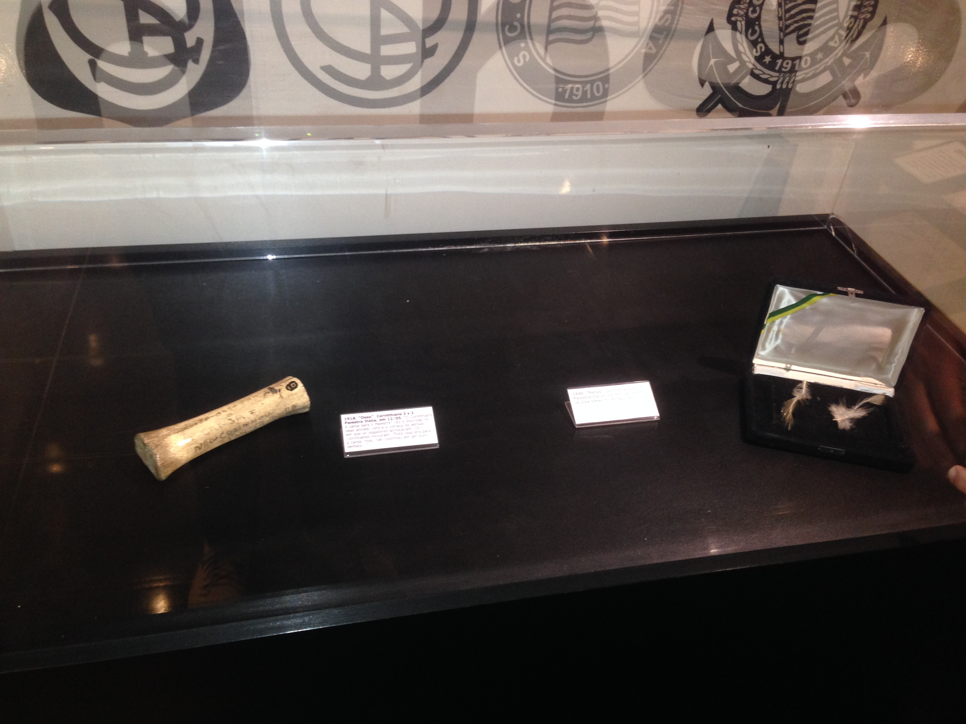 A foto foi tirada por mim no Memorial do Corinthians